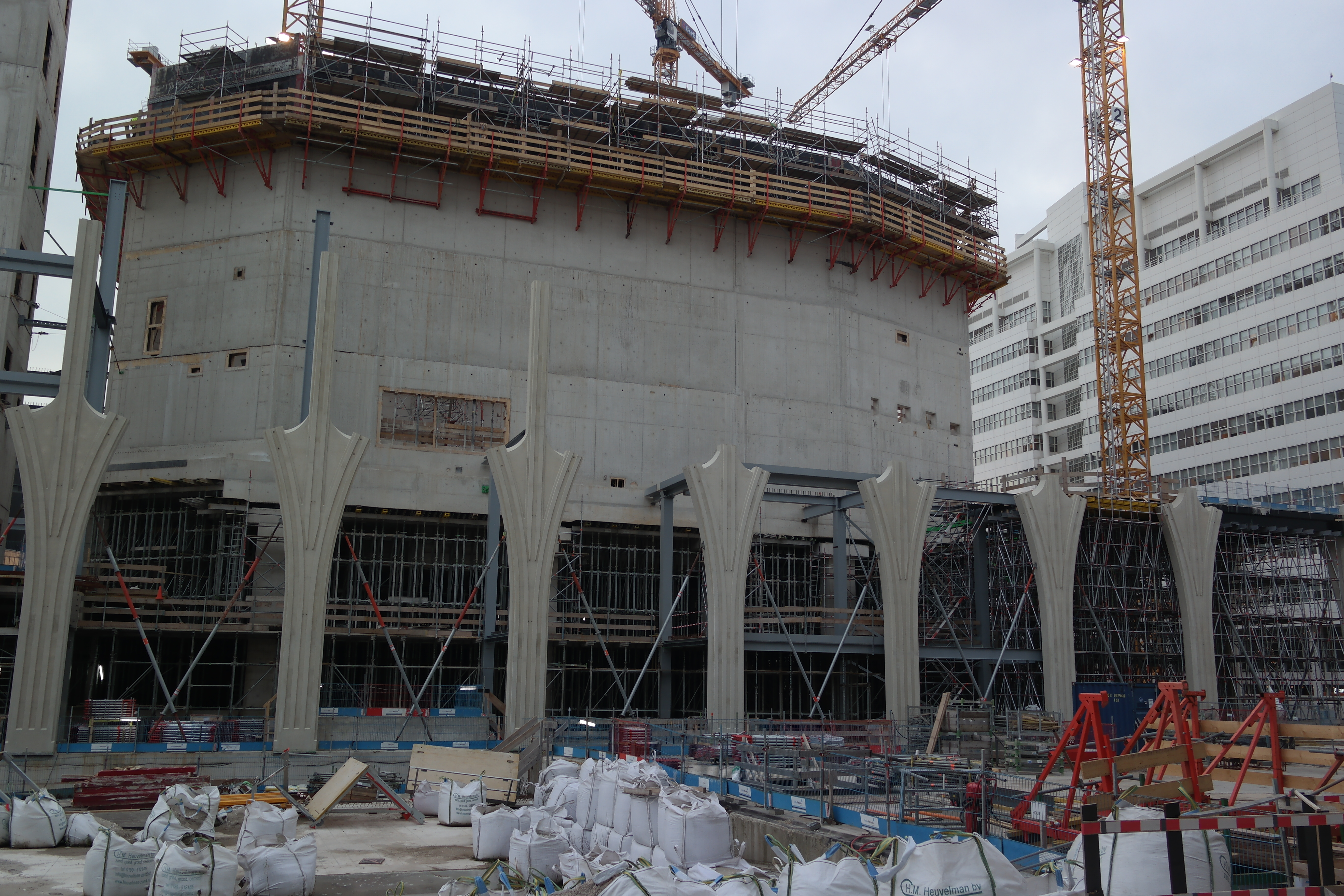 Cultuurcomplex Amare in Den Haag in aanbouw.